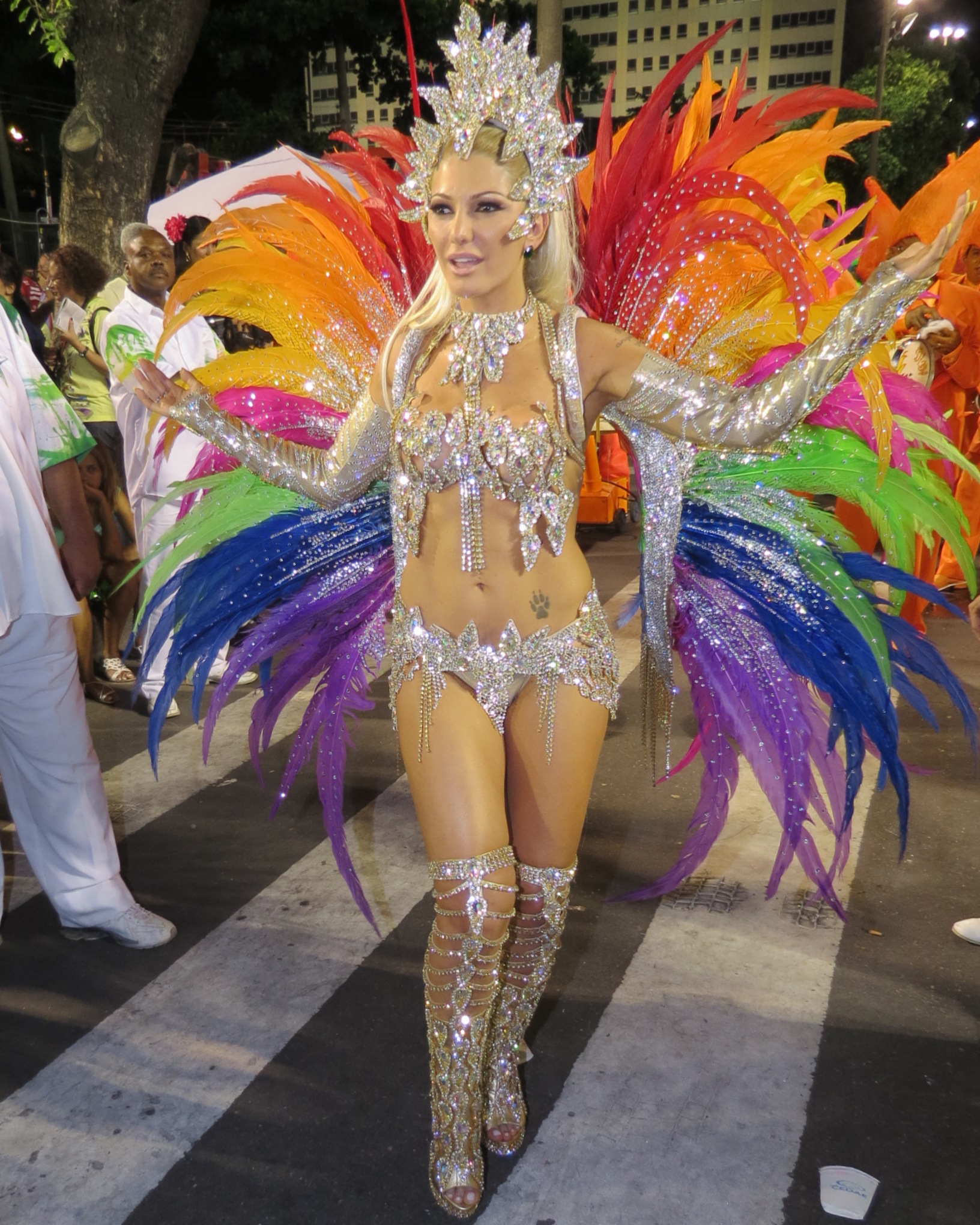 Escola de Samba Mocidade Independente de Padre Miguel Rio Carnaval 2012 05